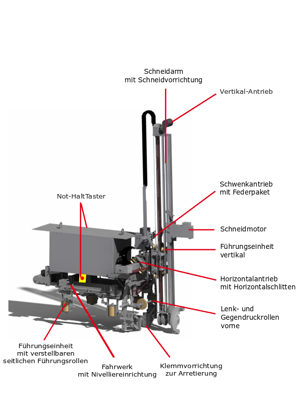 Schematische Darstellung einer Kerbschnittmaschine zum besseren Verständnis der Funktionsweise